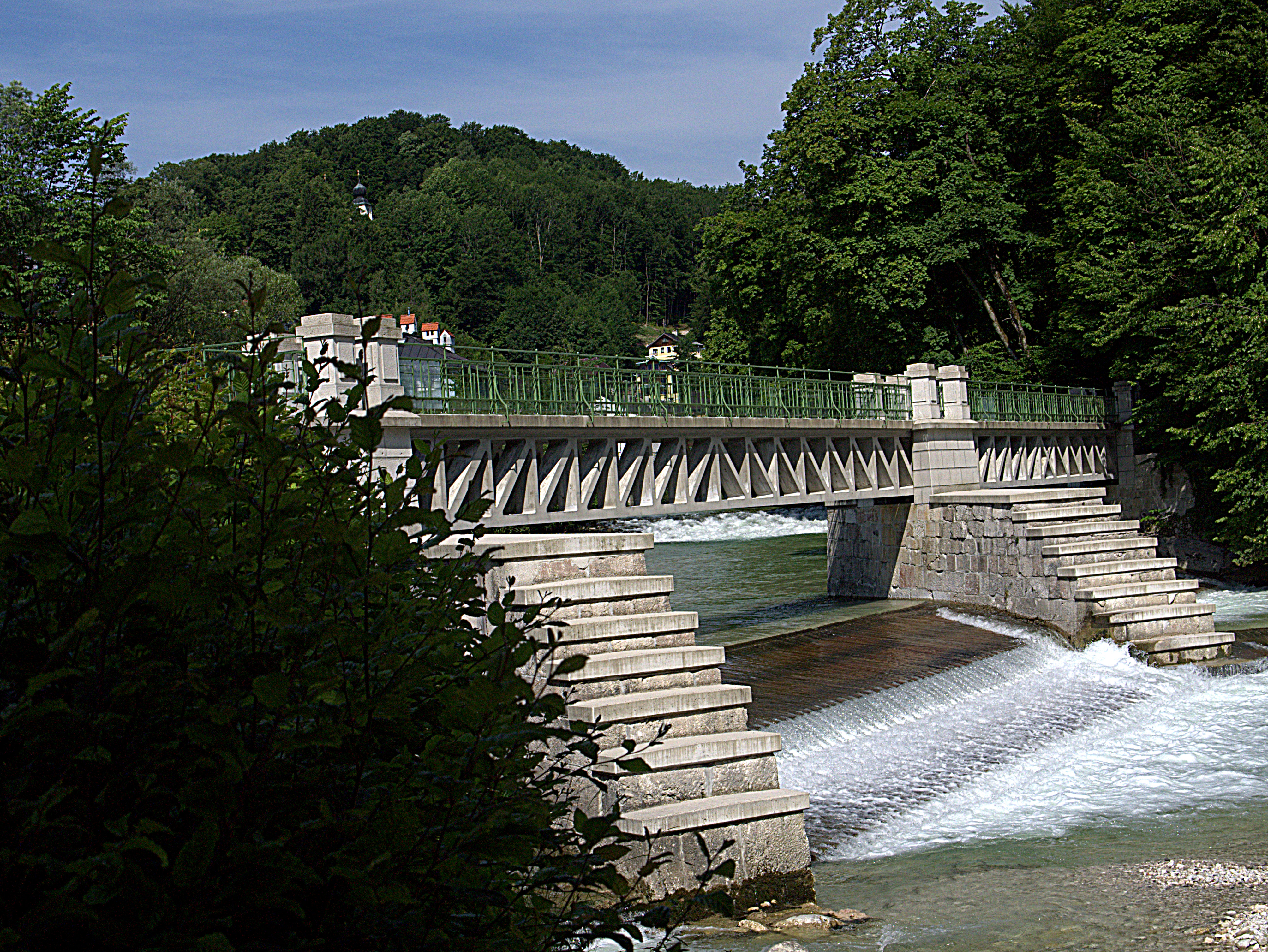 Rechensteg